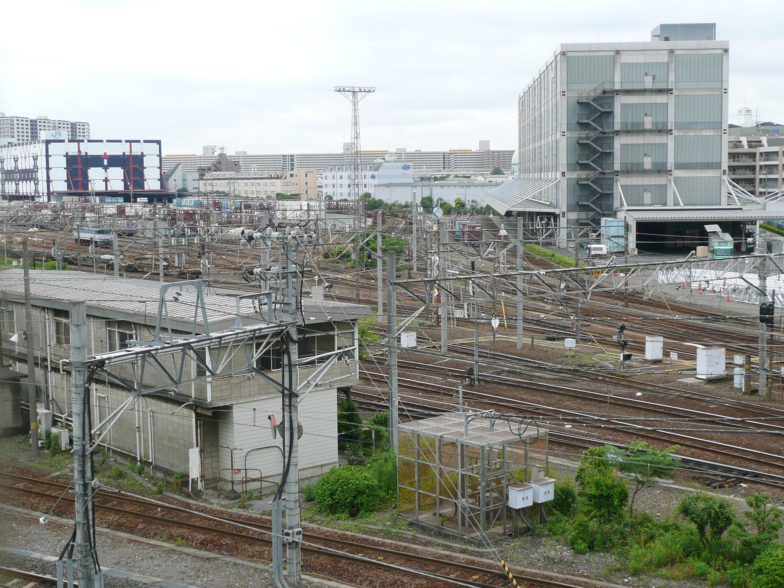 隅田川駅（東京メトロ南千住駅ホームから撮影）